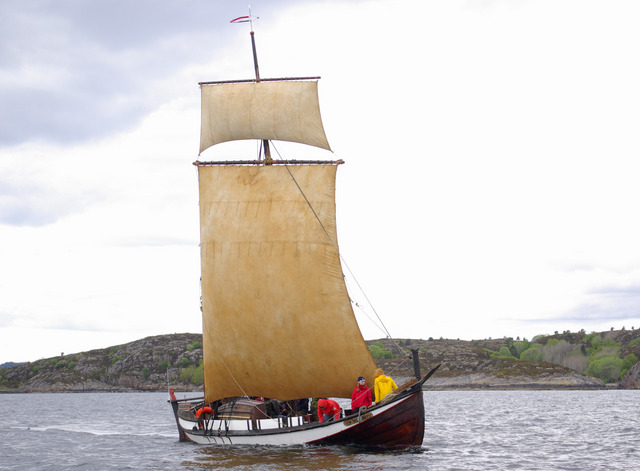 Åfjordsbåt, Skårungen